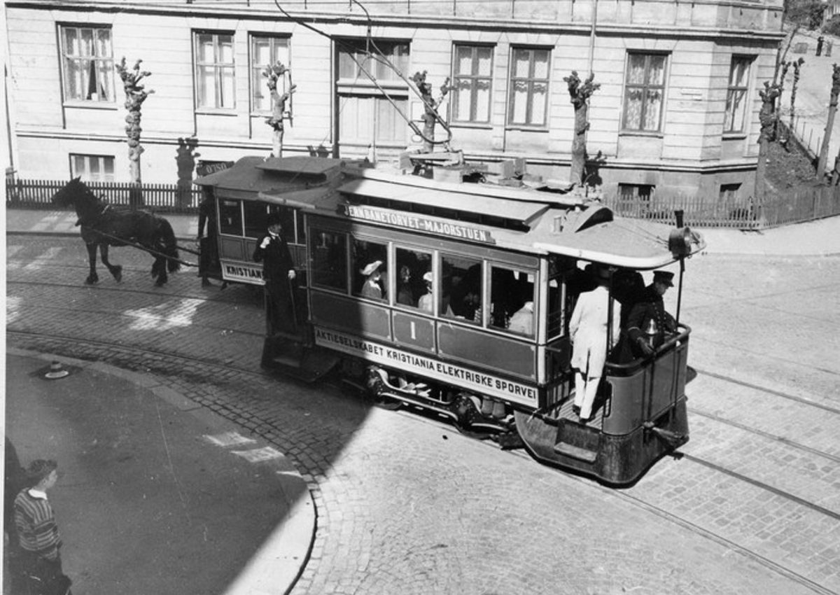 Gamle trikker under filmopptak i 1963, i krysset mellom Huitfeldts gate og (formodentlig) Cort Adelers gate). Fra Oslo byarkivs samling. Tekst i Digitalt musem: «Oslo Sporveier. Grønntrikkens hestesporvogn 6 og Blåtrikk motorvogn 1 type Allgemeine i Huitfeldts gate i forbindelse med filmopptak til Oslo Lysverkers jubileumsfilm i 1963.»